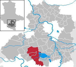 Verwaltungsgemeinschaft Oberes Geiseltal in Sachsen-Anhalt - Saalekreis